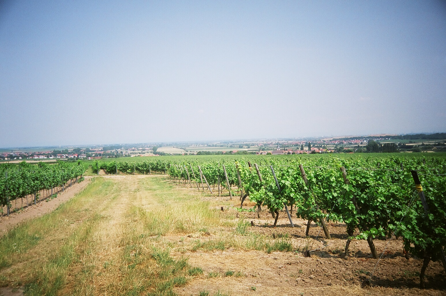 en: Plantation of grapes in Laumersheim, Germany. pl: Plantacja winogron w Laumersheim, Niemcy. de: Die Pflanzung der Weintrauben in Laumersheim. Author : Krzysztof Blachnicki